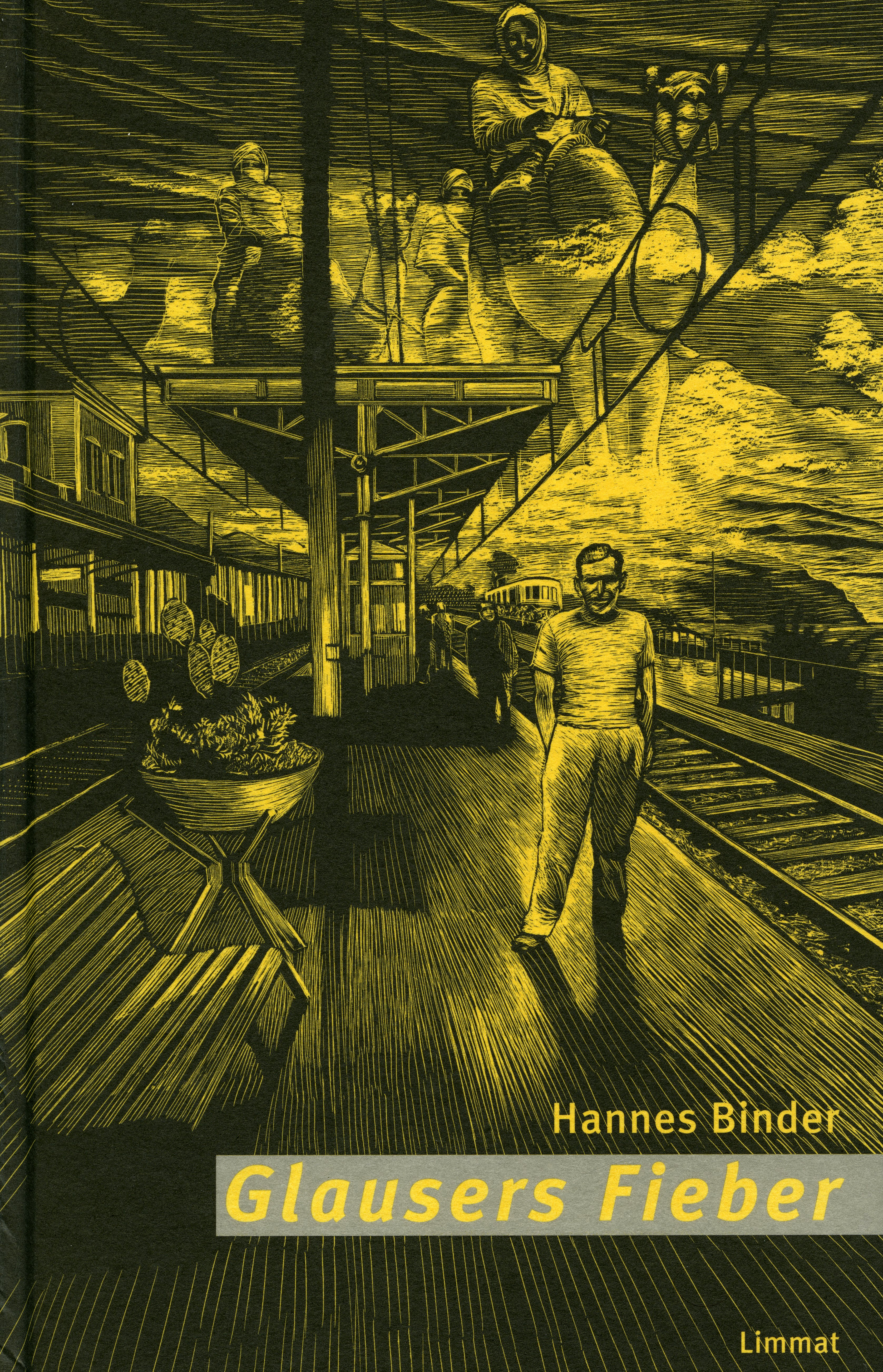 Buchcover von "Glausers Fieber" (Friedrich Glauser/Hannes Binder) in der Buchausgabe des "Limmat Verlags", Zürich 1998. Umschlagentwurf: Hannes Binder